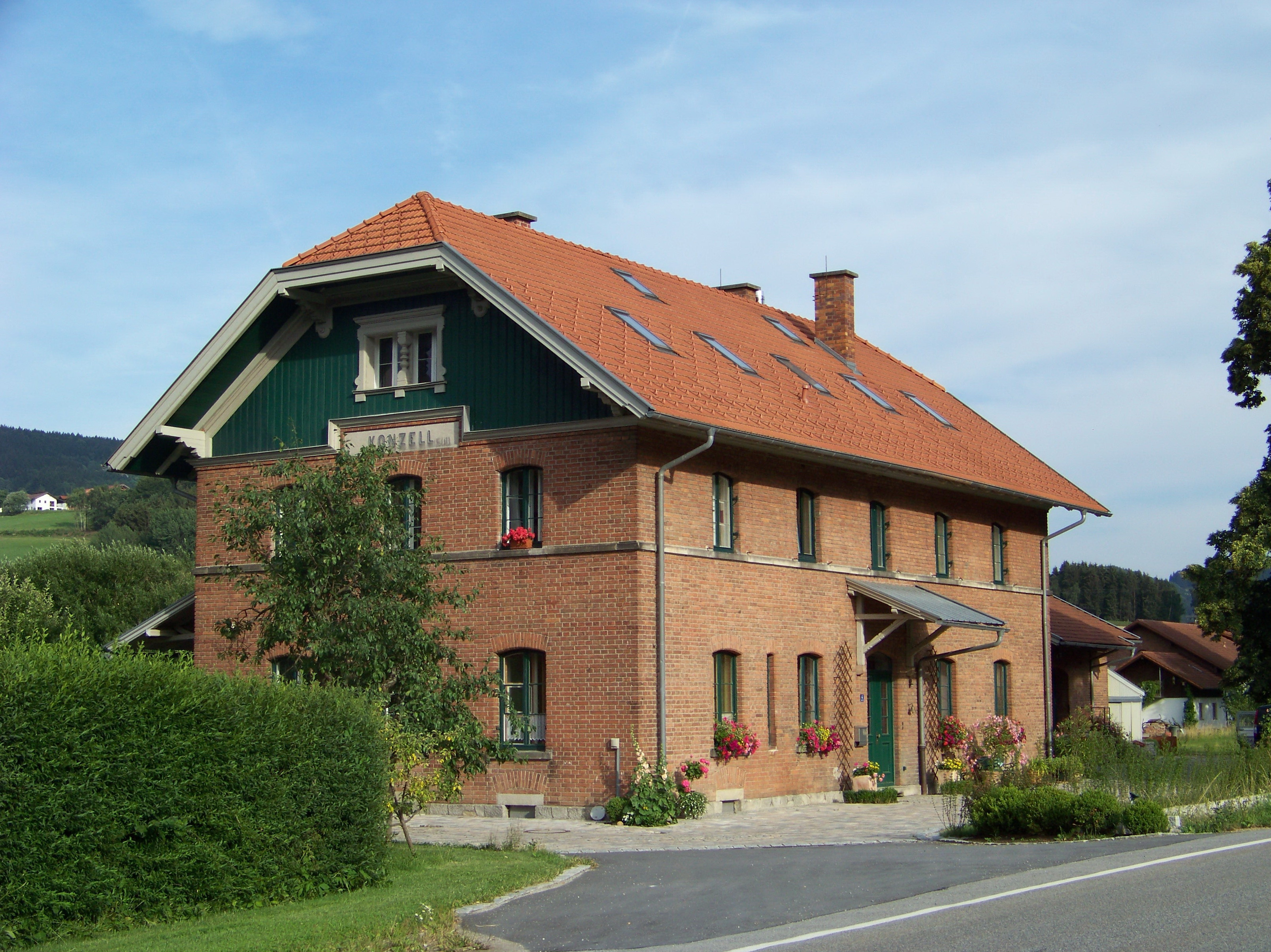 Konzell-Süd 4. Ehemaliger Bahnhof Konzell-Süd. Empfangsgebäude, zweigeschossiger Sichtziegelbau mit Schopfwalmdach und holzverschalten Giebeln. Güterhalle, eingeschossiger Sichtziegelbau mit Satteldach.